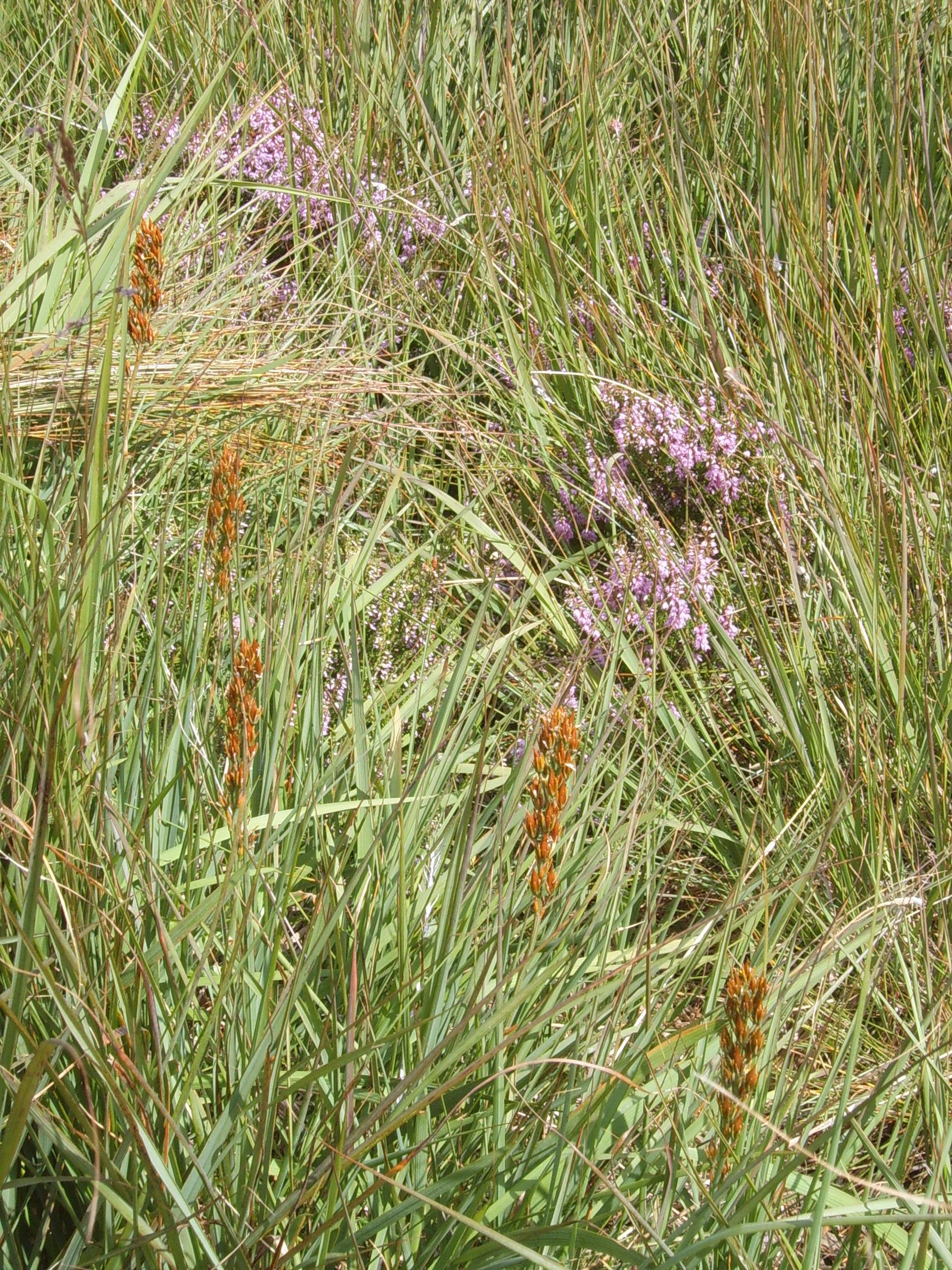 Bruyère quaternée et narthécie en Hautes Fagnes personal picture, I set in public domain.